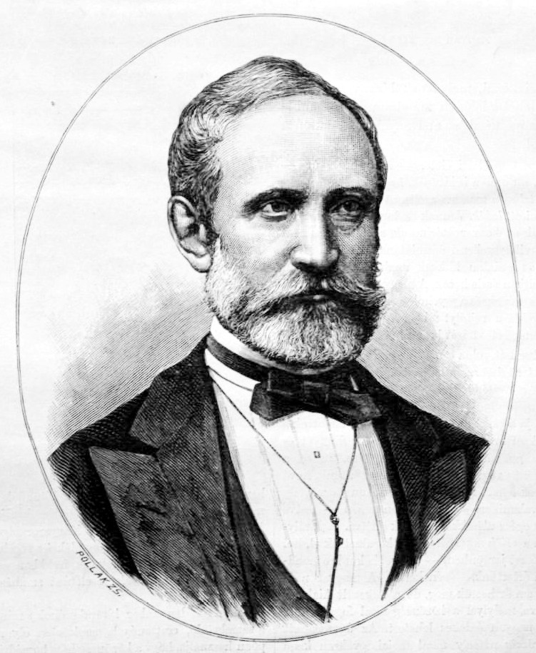 Gönczy Pál (1817–1892) pedagógus, a magyar népoktatásügy kiemelkedő képviselője, a Magyar Tudományos Akadémia levelező tagja. Pollák Zsigmond metszete